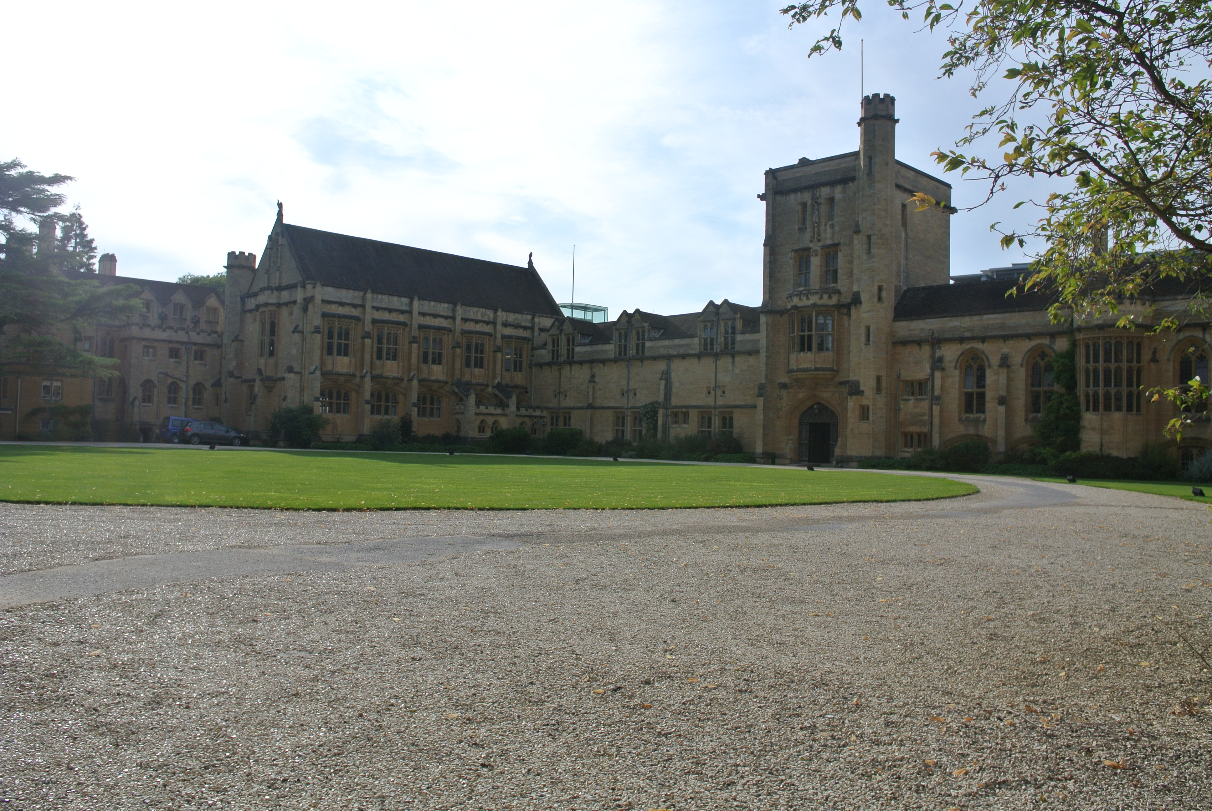 Mansfield College 正面から撮影